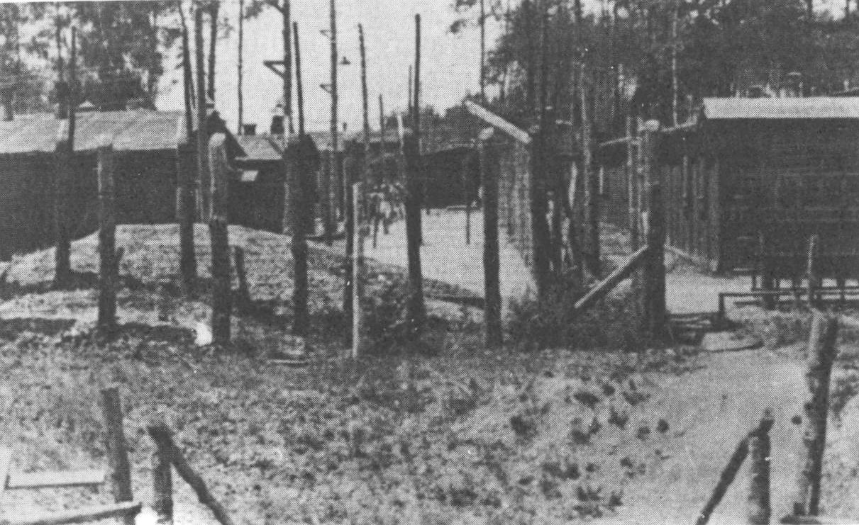 Taborišče Šterntal (Strnišče) pri Ptuju